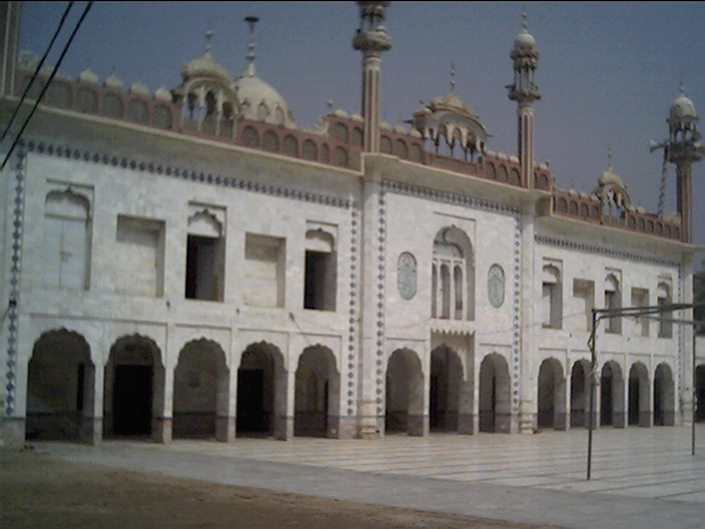 Hazrat Karmanala Sharif, Mosque, Okara, Pakistan.